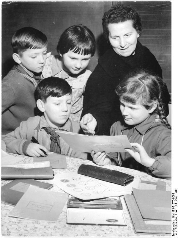 Bucha, Hausaufgabenbetreuung im Hort Zentralbild Schneider Zü-Noa 24.3.1960 Groß-LPG "Ernst Thälmann" in Bucha-Schorba im Kreis Eisenberg Im Rahmen des NAW haben sich einige Frauen der Gemeinde Bucha verpflichtet, die Erfüllung der Hausaufgaben der Kinder im Schulhort der allgemeinvildenden polytechnischen Oberschule täglich zu überprüfen. UBz: Frau Wilhelmine Papst bei der Kontrolle der Hausaufgaben.